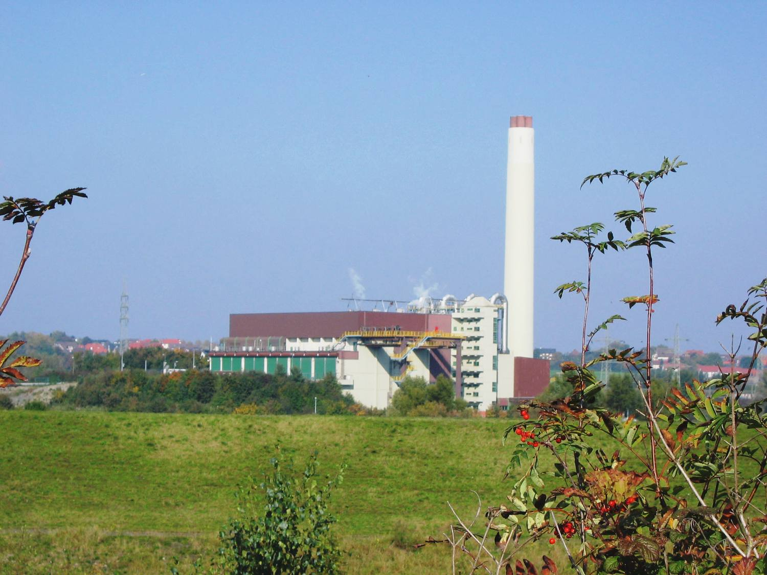 Müllverbrennungsanlage in Hamm/Westfalen